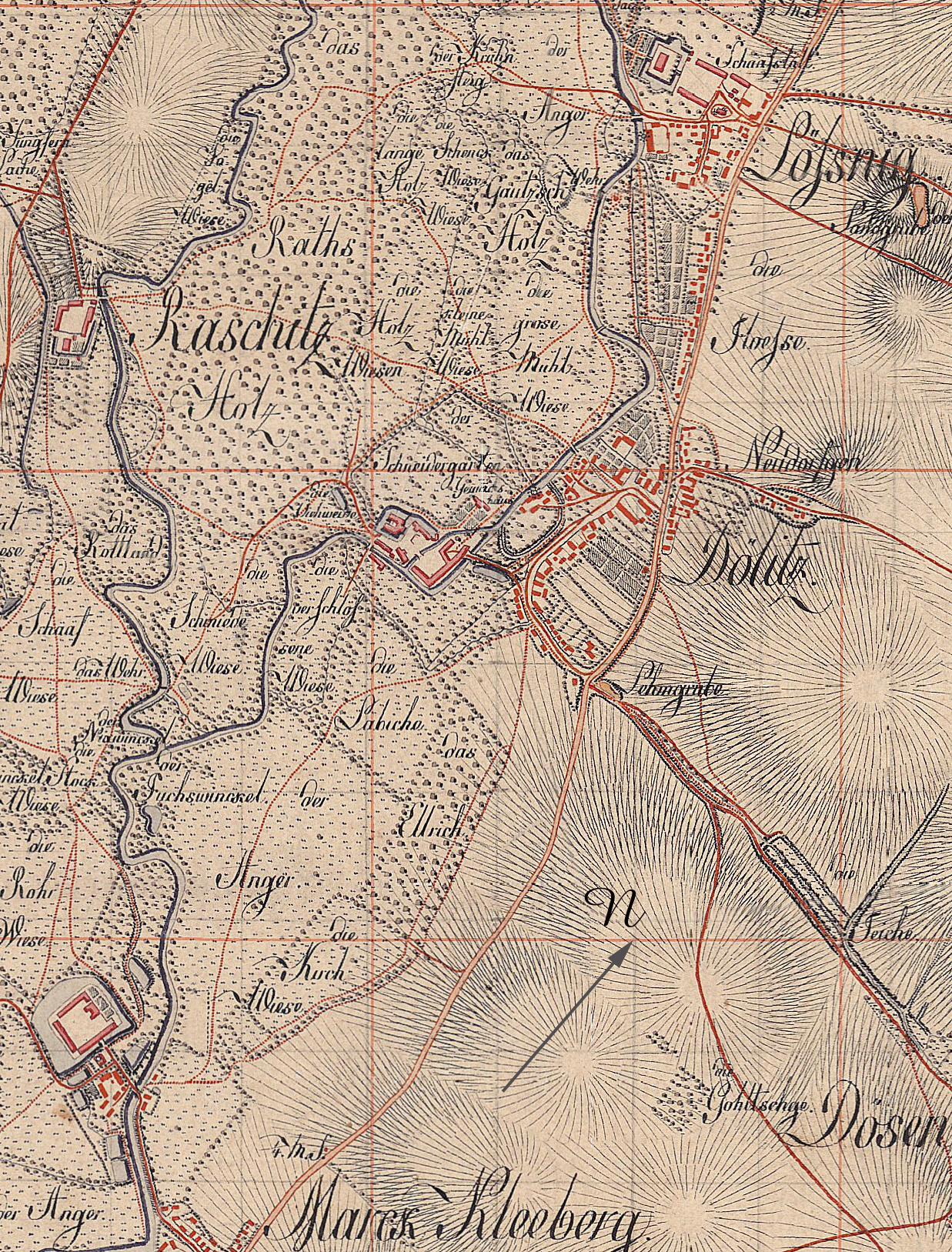 Dölitz auf einer Karte um 1800 (Ausschnitt aus Meilenblätter von Sachsen 1780-1806)